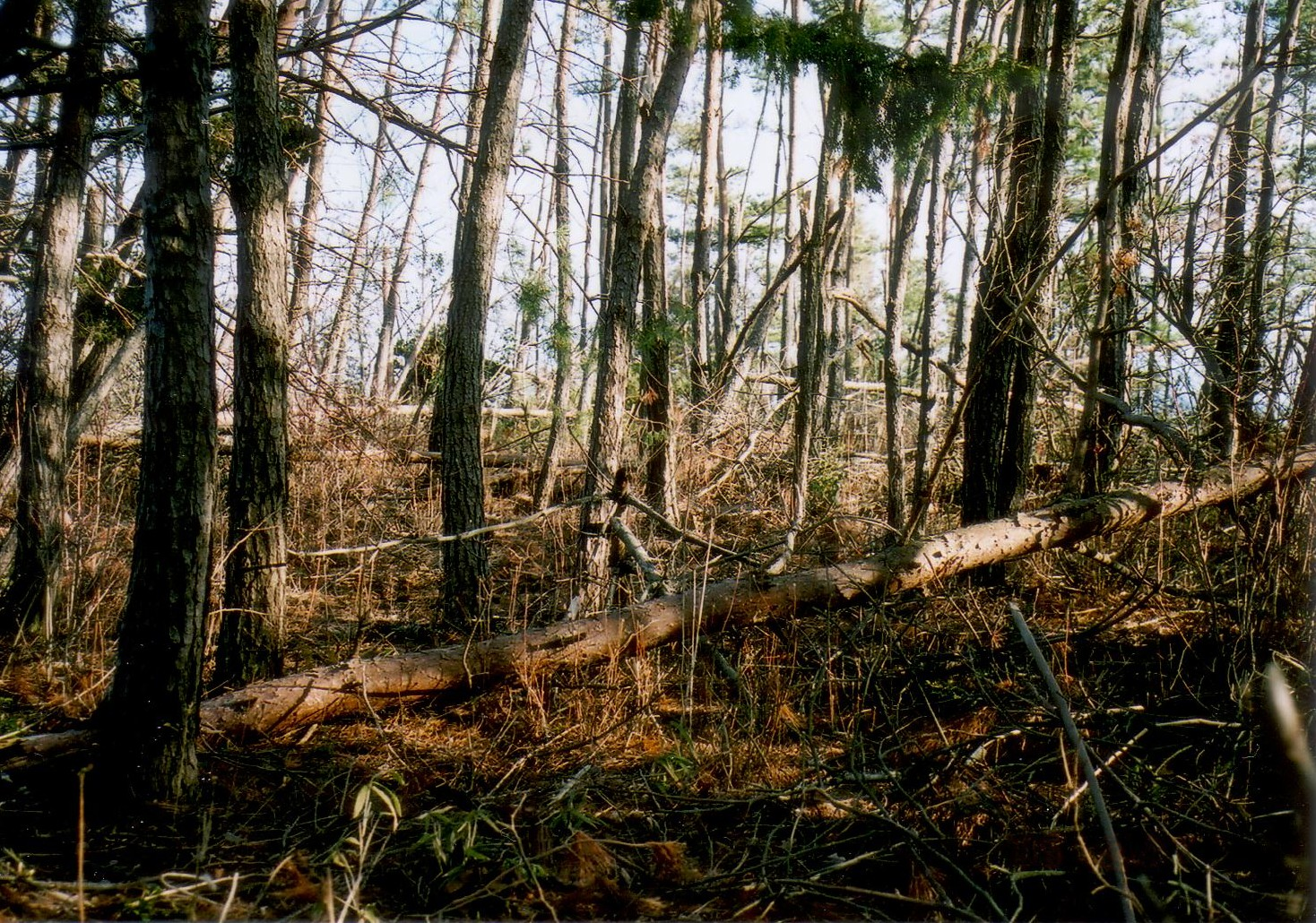 Sj-banyu3